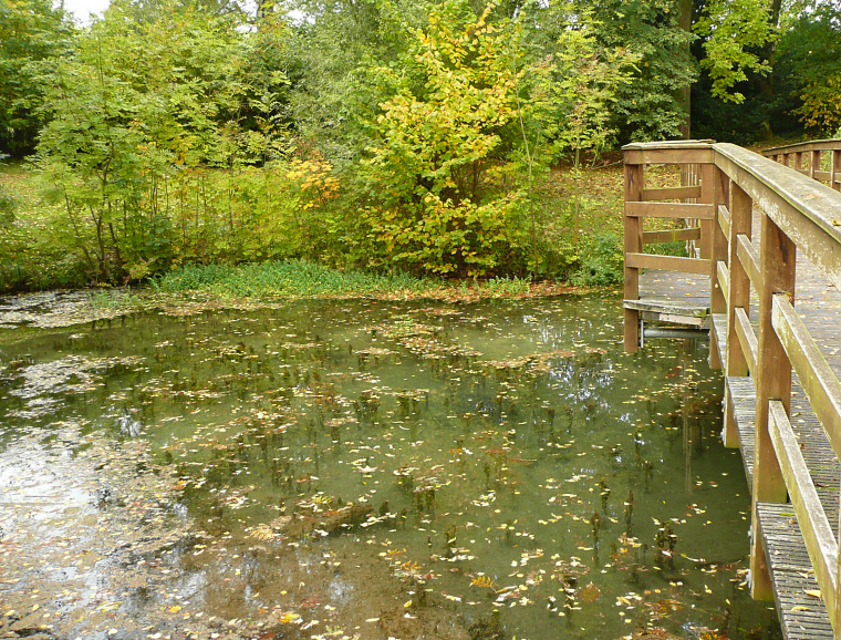 Quellteich der Treibsandquelle, Bad Zwesten, Oktober 2008